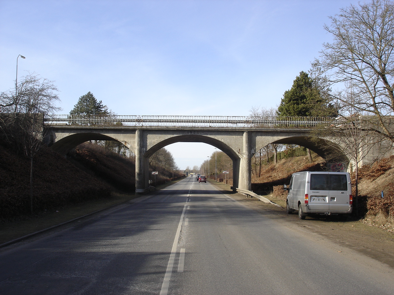 Højbro fra 1924 V for stationen i Nykøbing Mors med plads til dobbeltsporet statsbane til Thisted th. og privatbane til Karby tv.